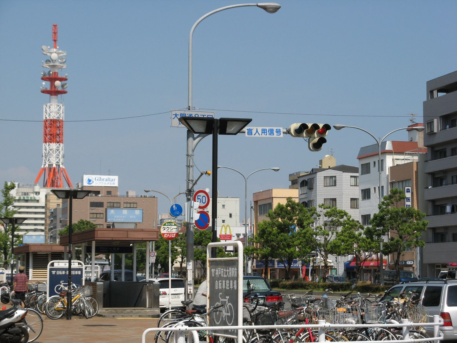 大開駅 出入口 Template:コモンズへの移動推奨